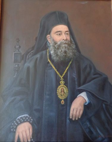 Μητροπολίτης Θηβών και Λεβαδείας